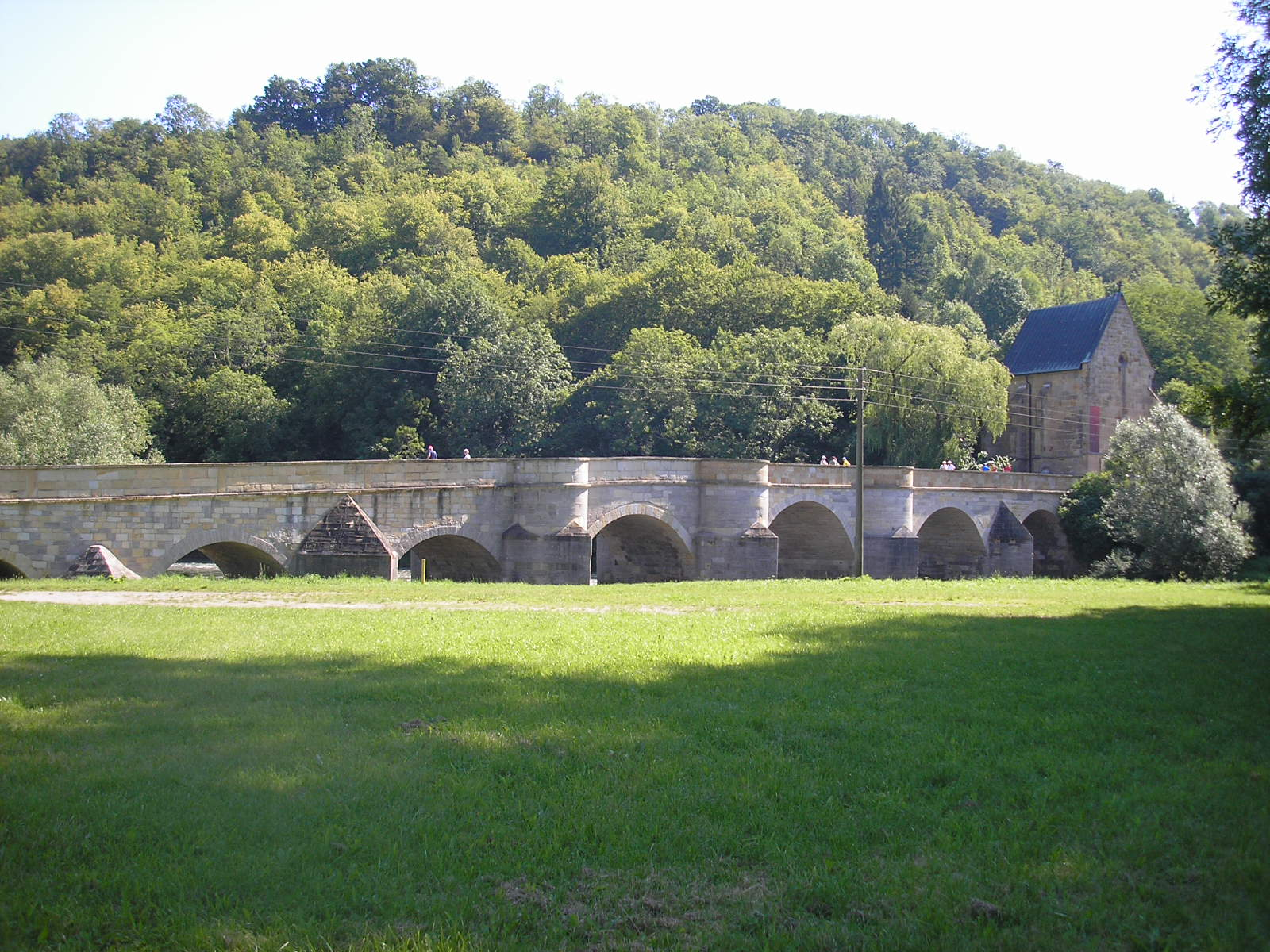 Die Werrabrücke in Creuzburg (Thüringen), rechts die Liboriuskapelle.